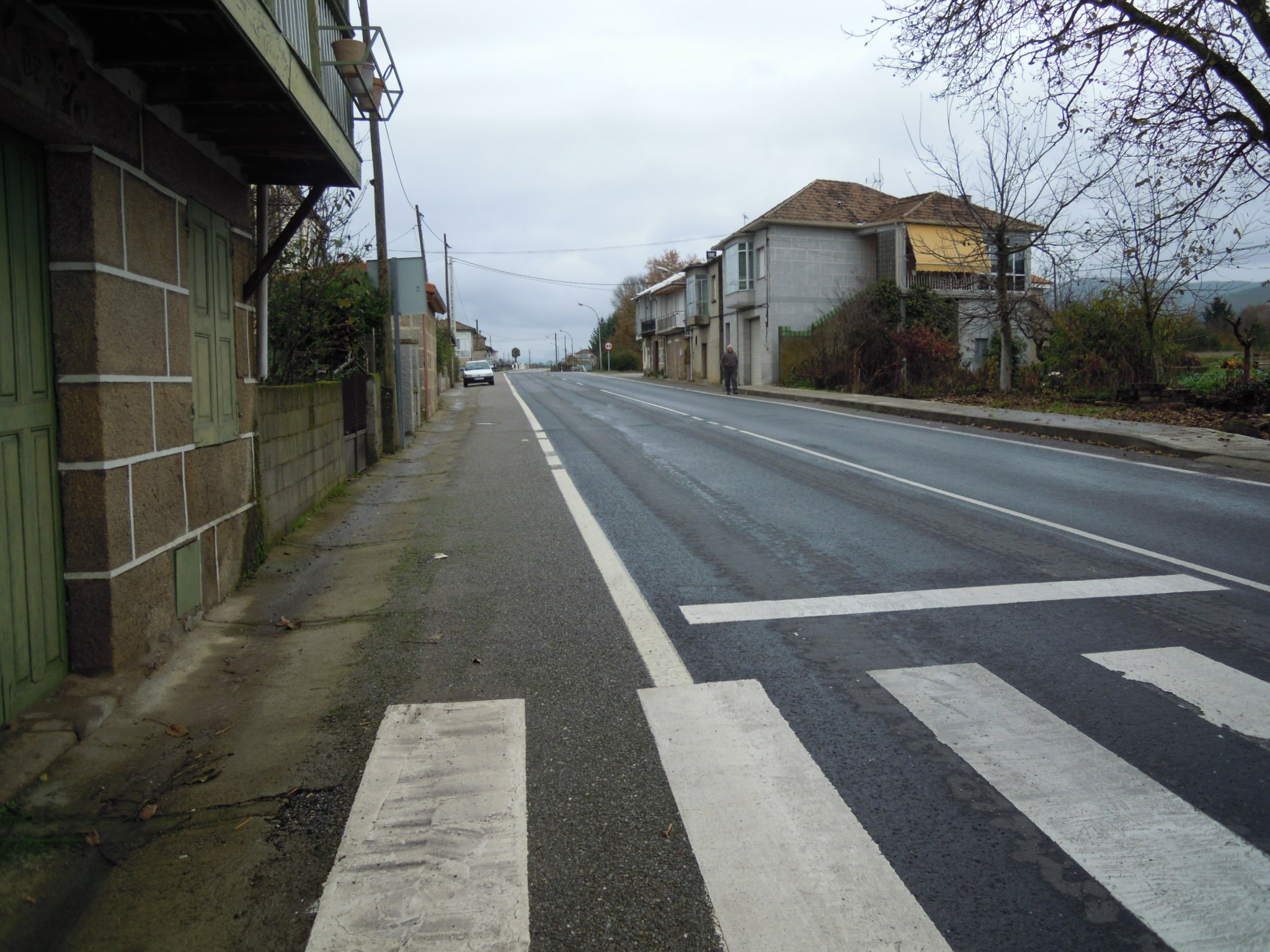 Estrada N-532 ao seu paso por Tamaguelos (Verín).